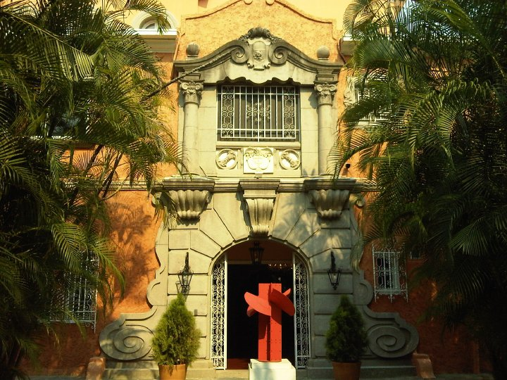 La "Quinta Colombia", localizada en la Urbanización Campo Alegre de Caracas, es la Residencia Oficial de la Embajada de Colombia en Venezuela. Fue construida en la década de 1930 por el ex presidente venezolano Juan Vicente Gómez, y cedida posteriormente al Gobierno de Colombia.